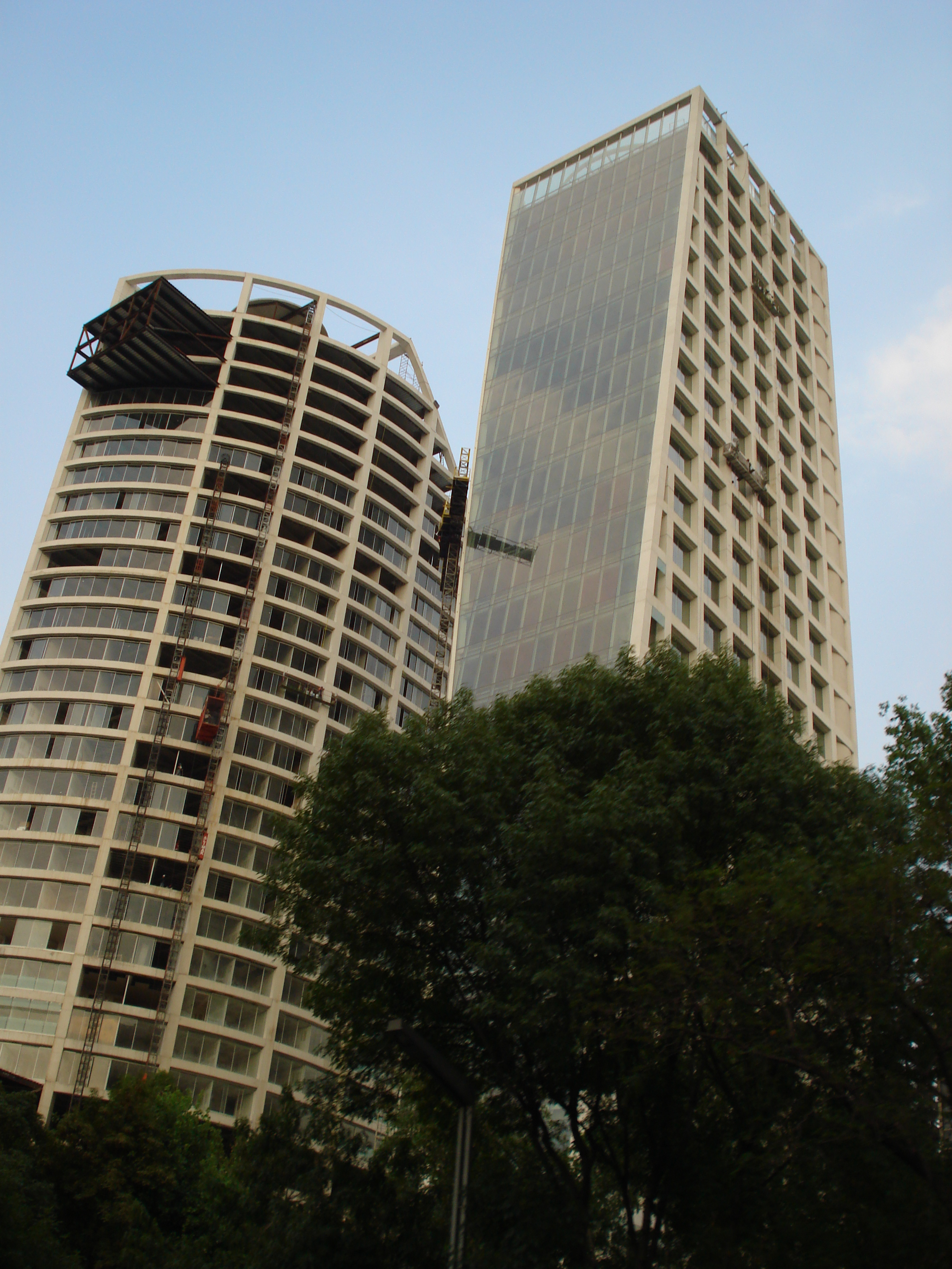 Edificios Reforma 222, Torre 1 y 2, de una altura de 125.8 metros.